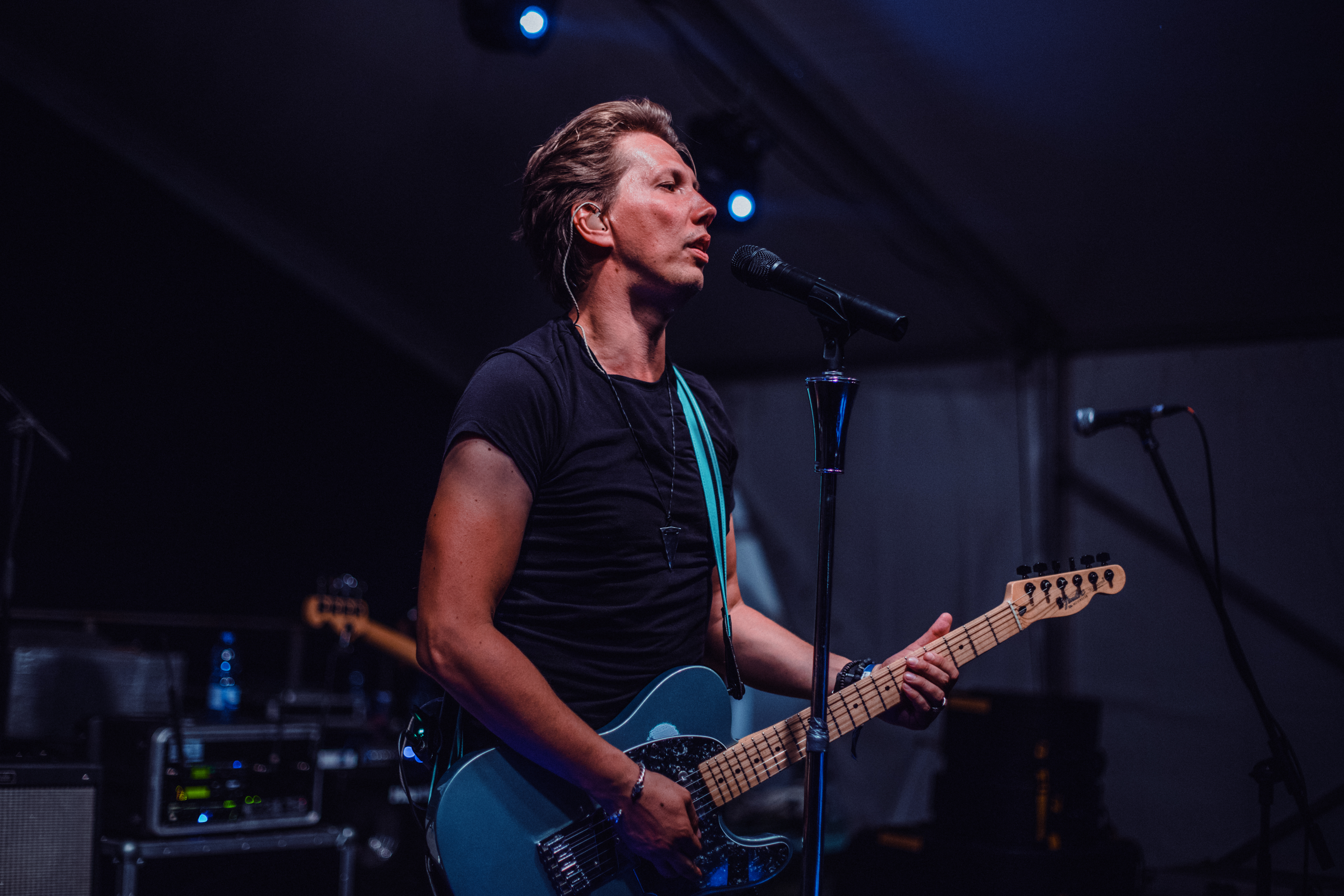 Peter Cmorik, Strekovský festival vína 2019